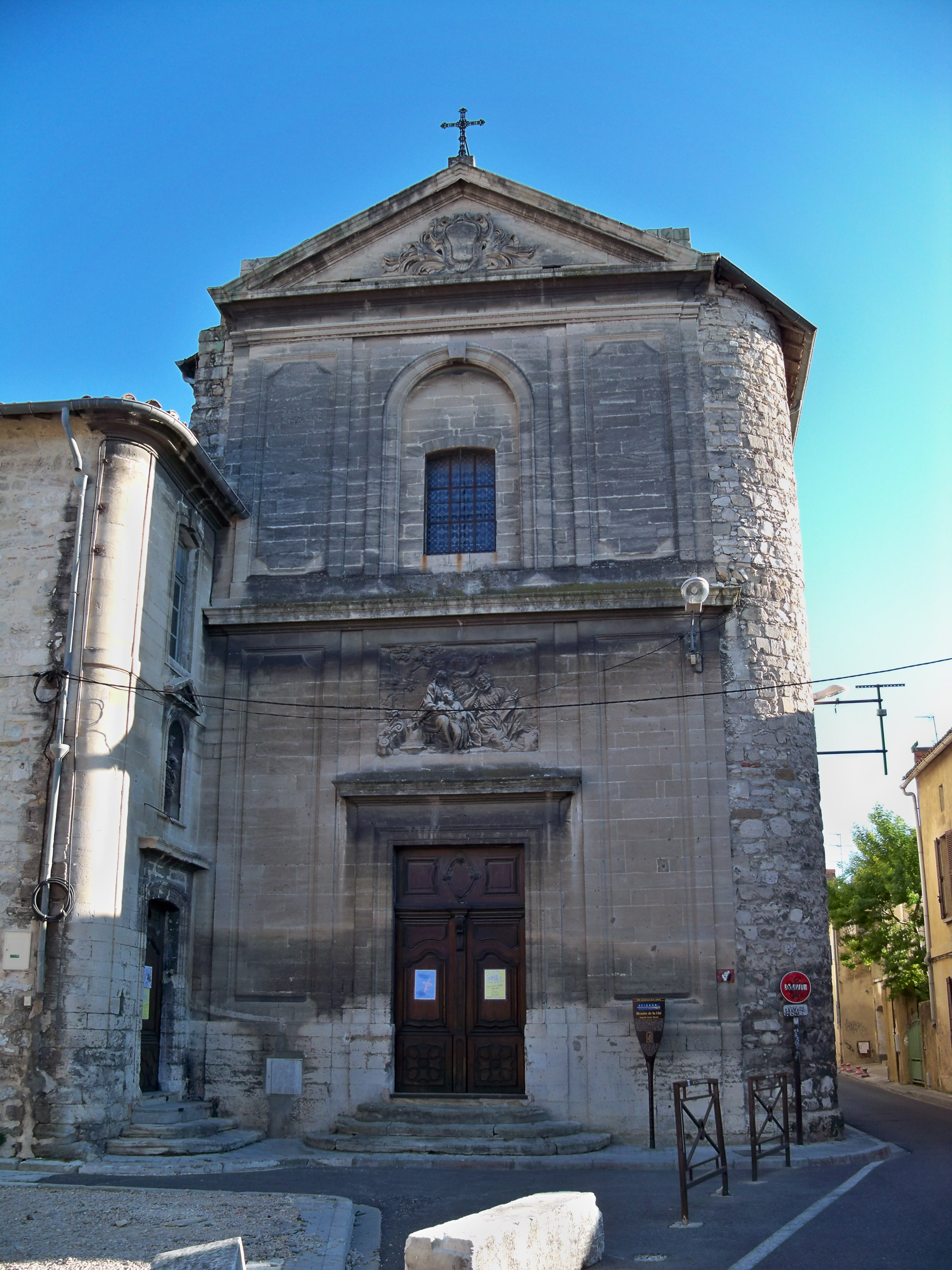 Chapelle Sainte-Marthe à Avignon (84)